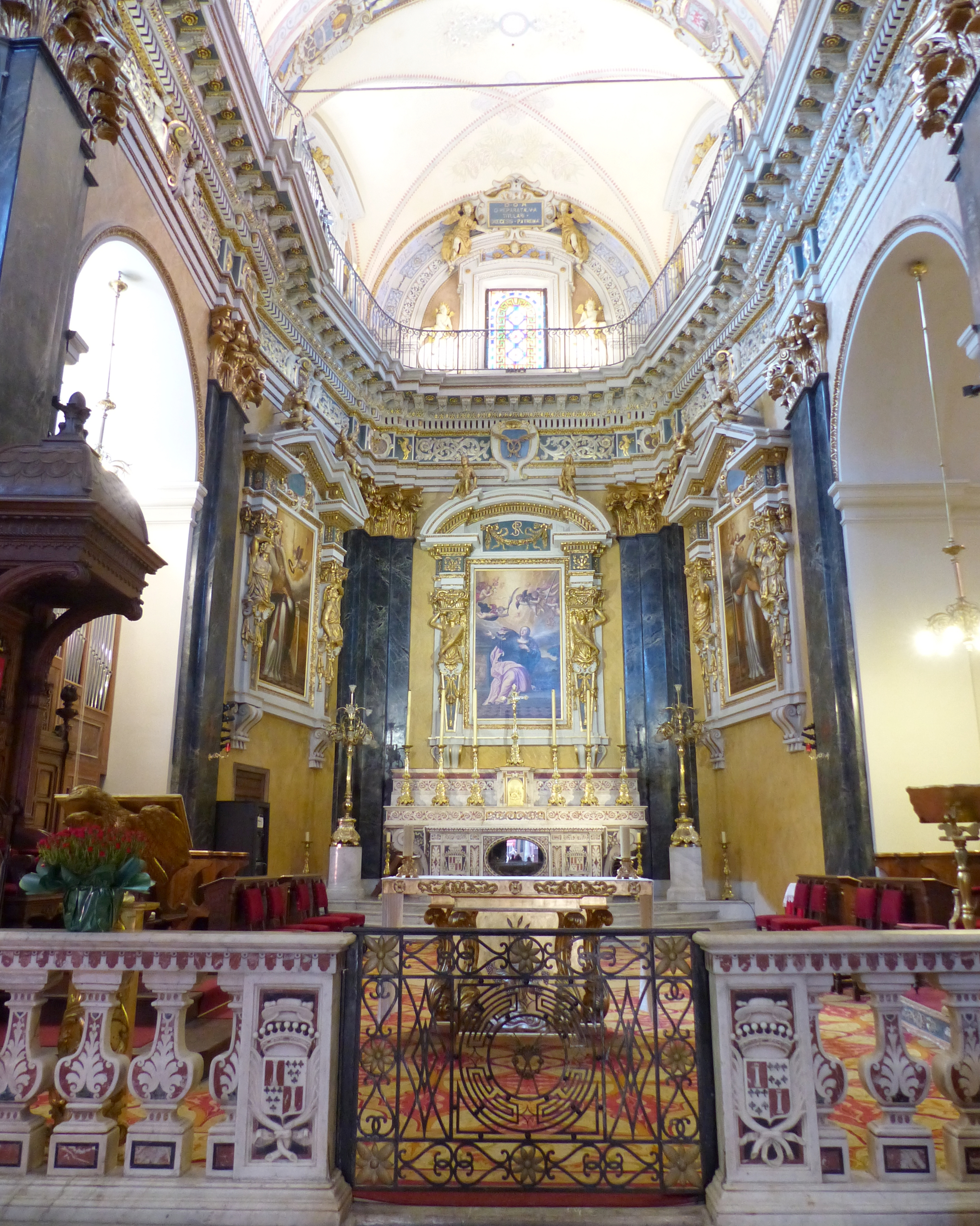 Nice (Alpes-Maritimes, France), cathédrale Ste Réparate, dans l'abside médiane, le chœur ou plutôt le sanctuaire; au premier plan la clôture formée de balustres de marbre avec porte en fer forgé.